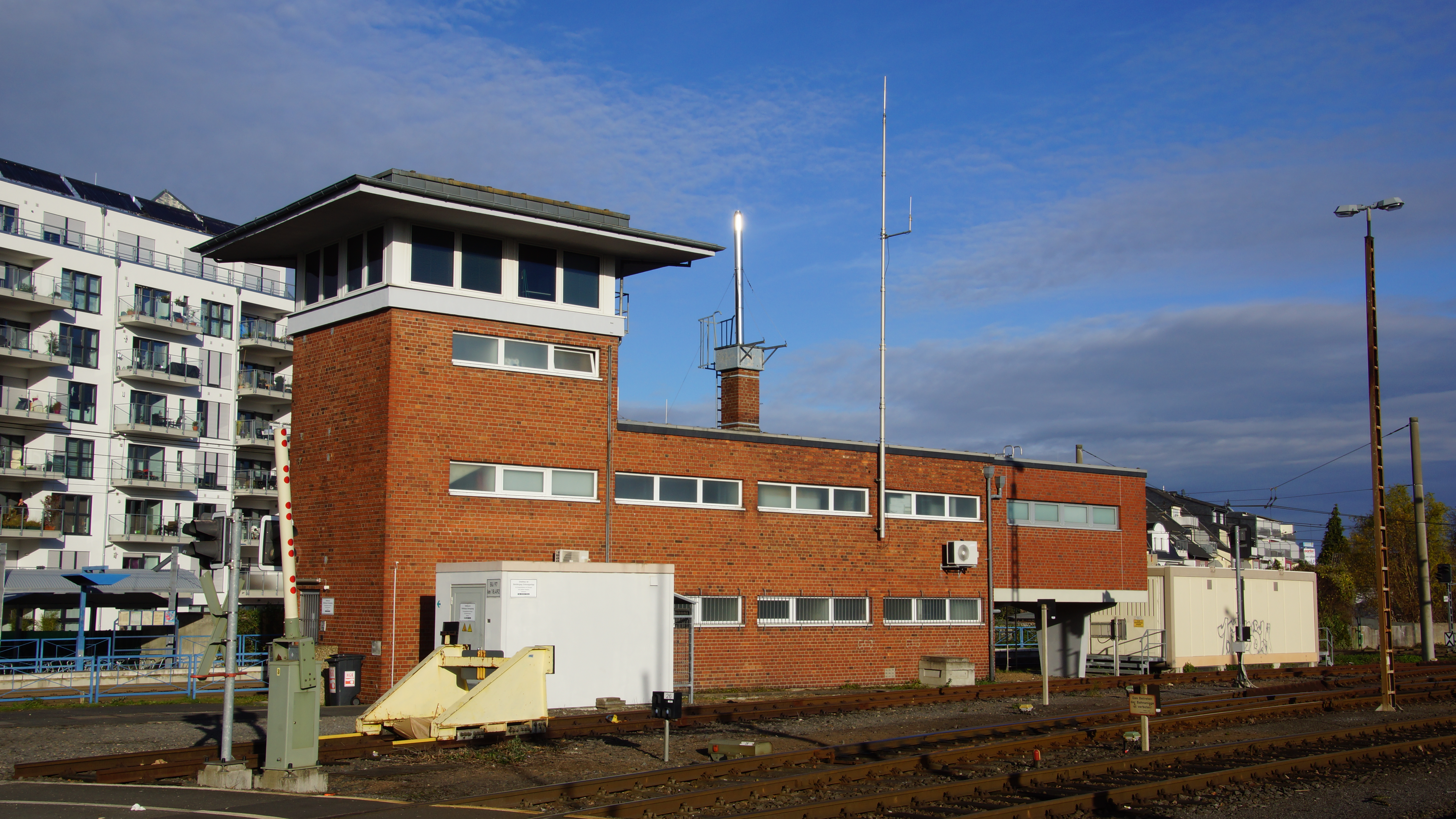 Stellwerk Bahnhof Frechen (ehemaliger) Güterbahnhof Frechen der Köln-Frechen-Benzelrather Eisenbahn/HGK, Kölner Straße, seit 2004 von Kendenich aus ferngesteuert